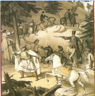 Το πέρασμα του Ζυγού. Έγχρωμη λιθογραφία Πηγή: Dupré L. 1825, Voayage à Athènes et à Constantinople, Paris